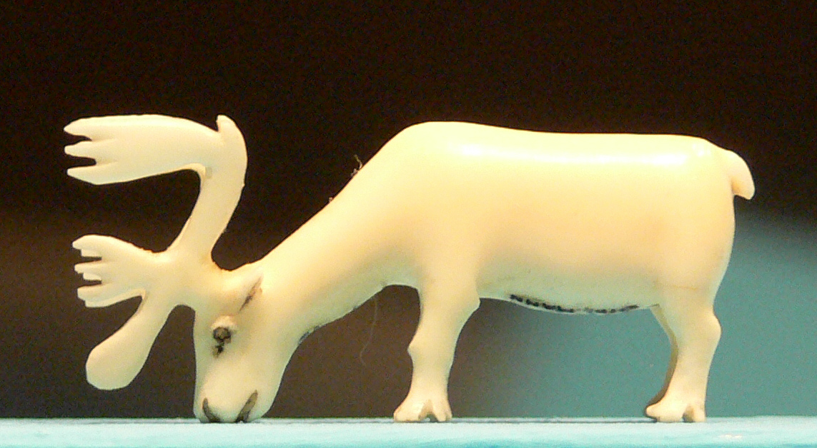 Stuttgart, Linden-Museum Grasendes Karibu (Rentier), Walrosszahnbein, Alaska um 1910